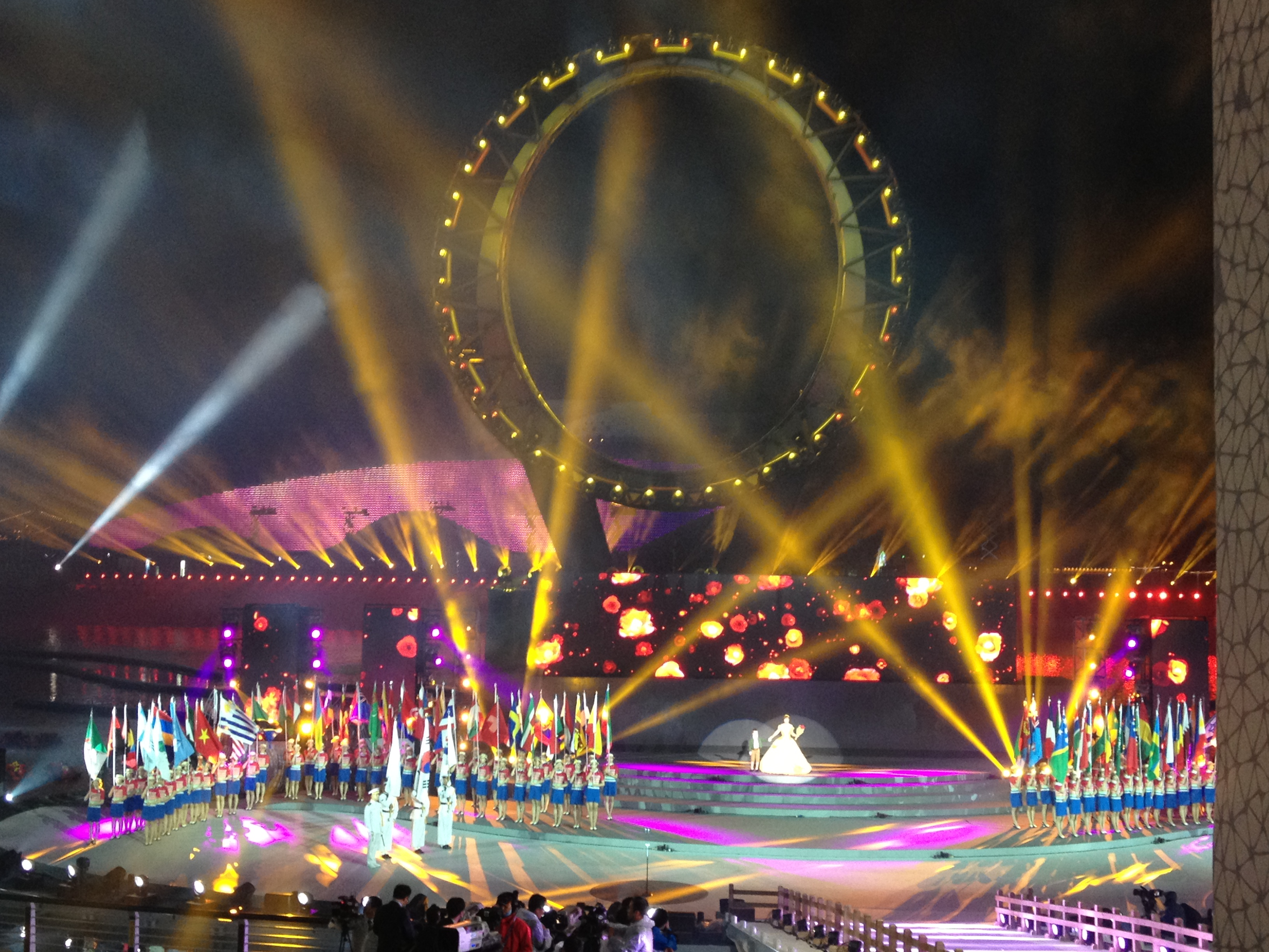 En la noche del viernes 11 de mayo se celebró la Ceremonia de Inauguración de la Exposición Internacional 2012, Yeosu, Corea.